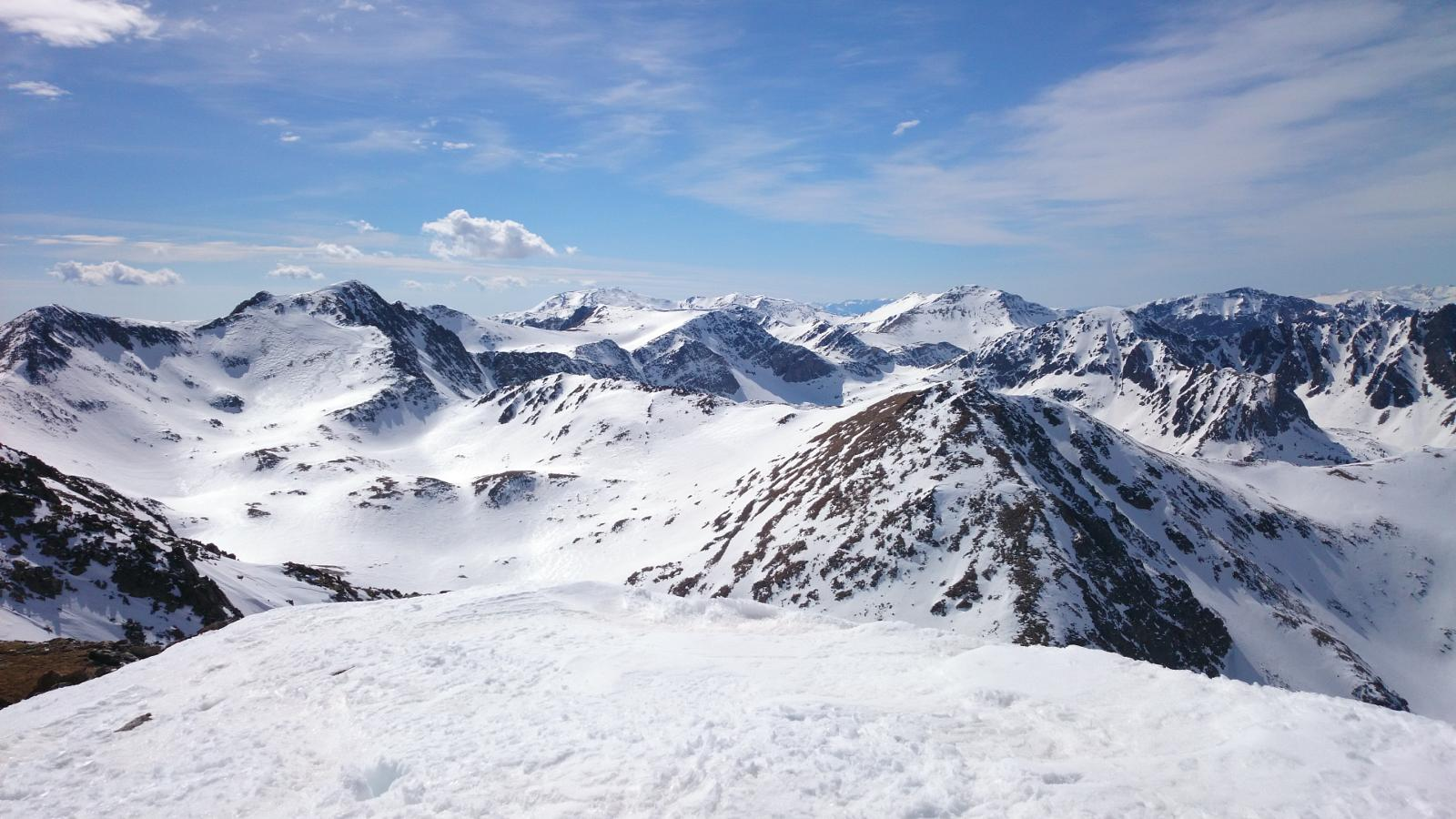 En cataluña